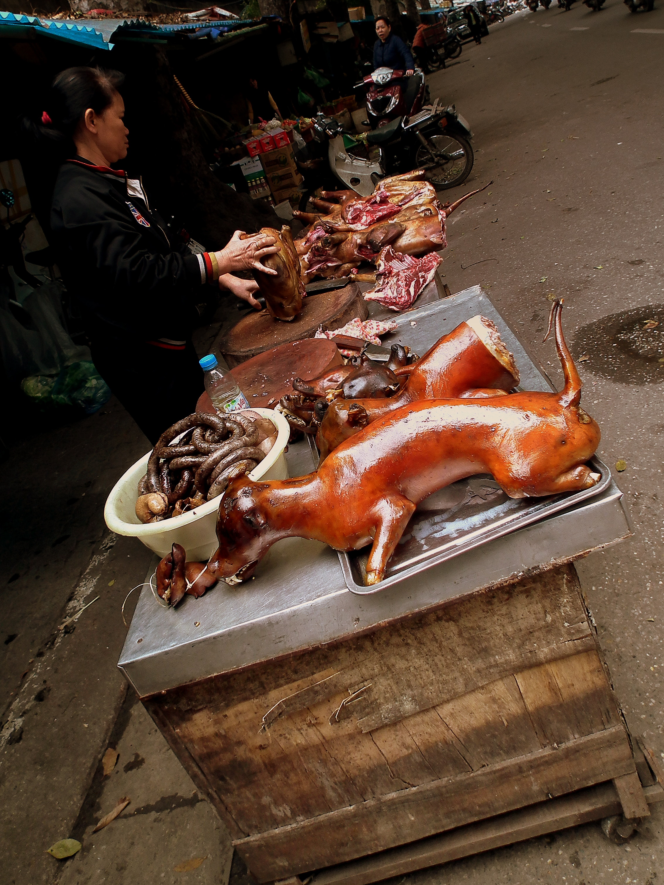 Dog meat for sale in a market in Hanoi, Vietnam